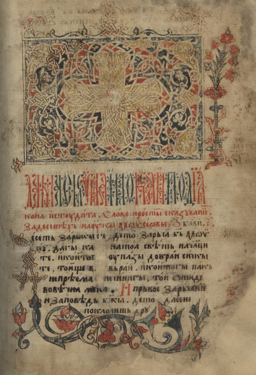 Троянский дамаскин, Болгария